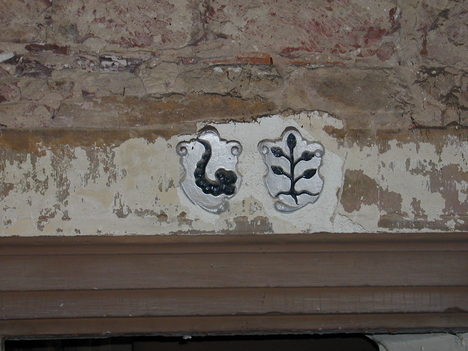 Wasserschloss Sommerau Wappen über Tür.